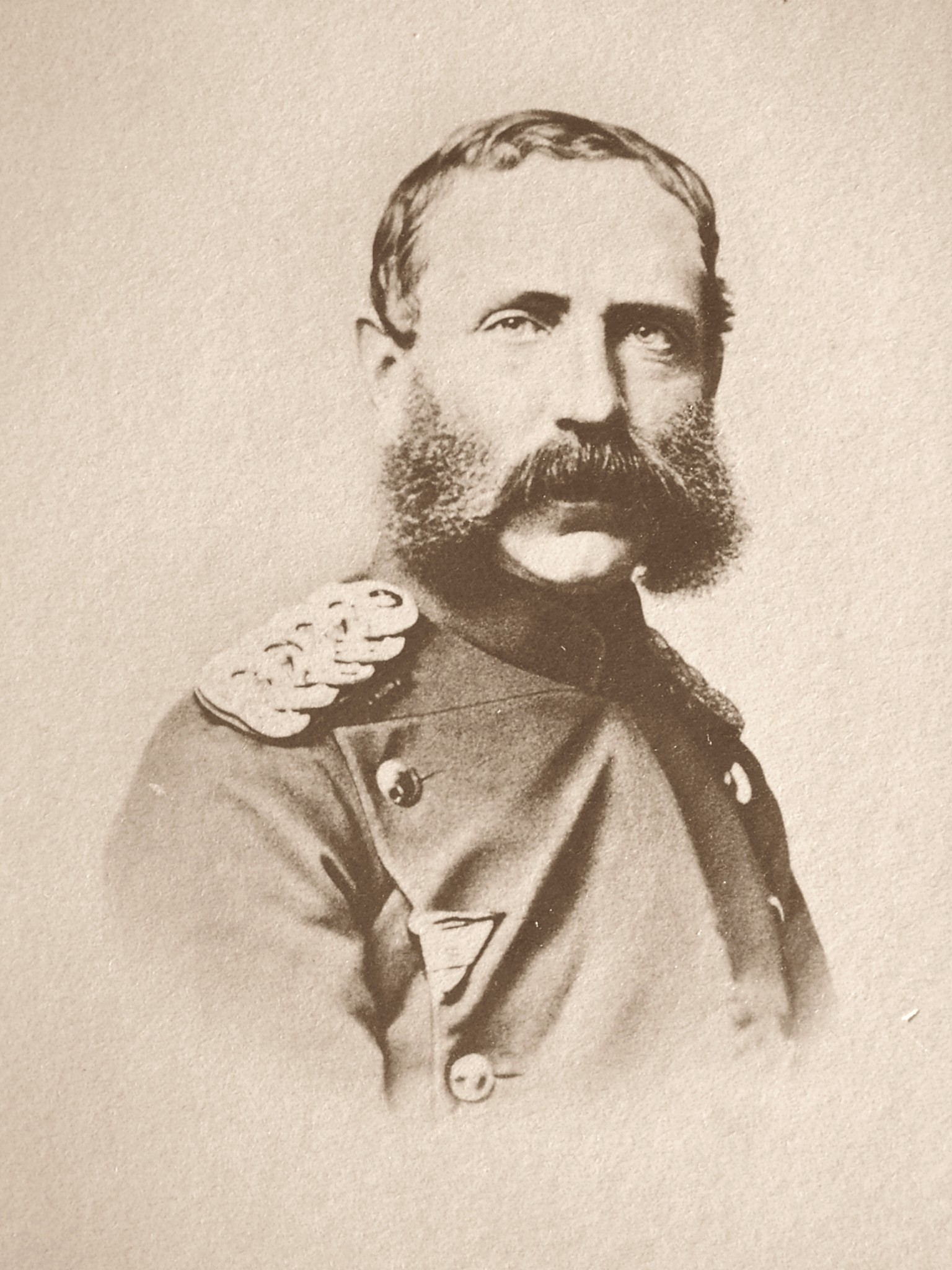 Kronprinz Albert von Sachsen